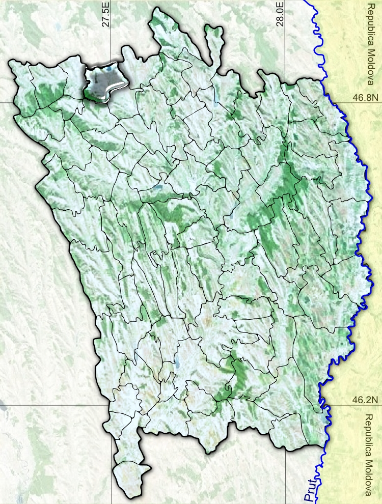 Negresti jud Vaslui.